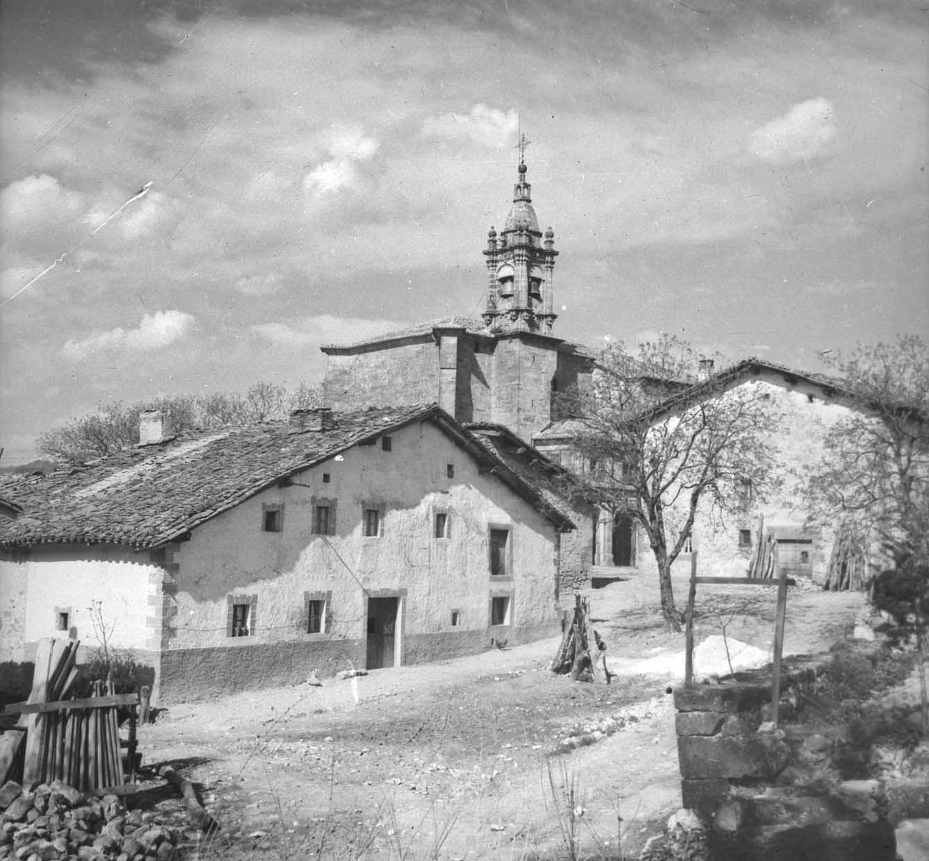 Iturmendiko ikuspegia 1960ko hamarkadan. Argazkia Indalecio Ojanguren.